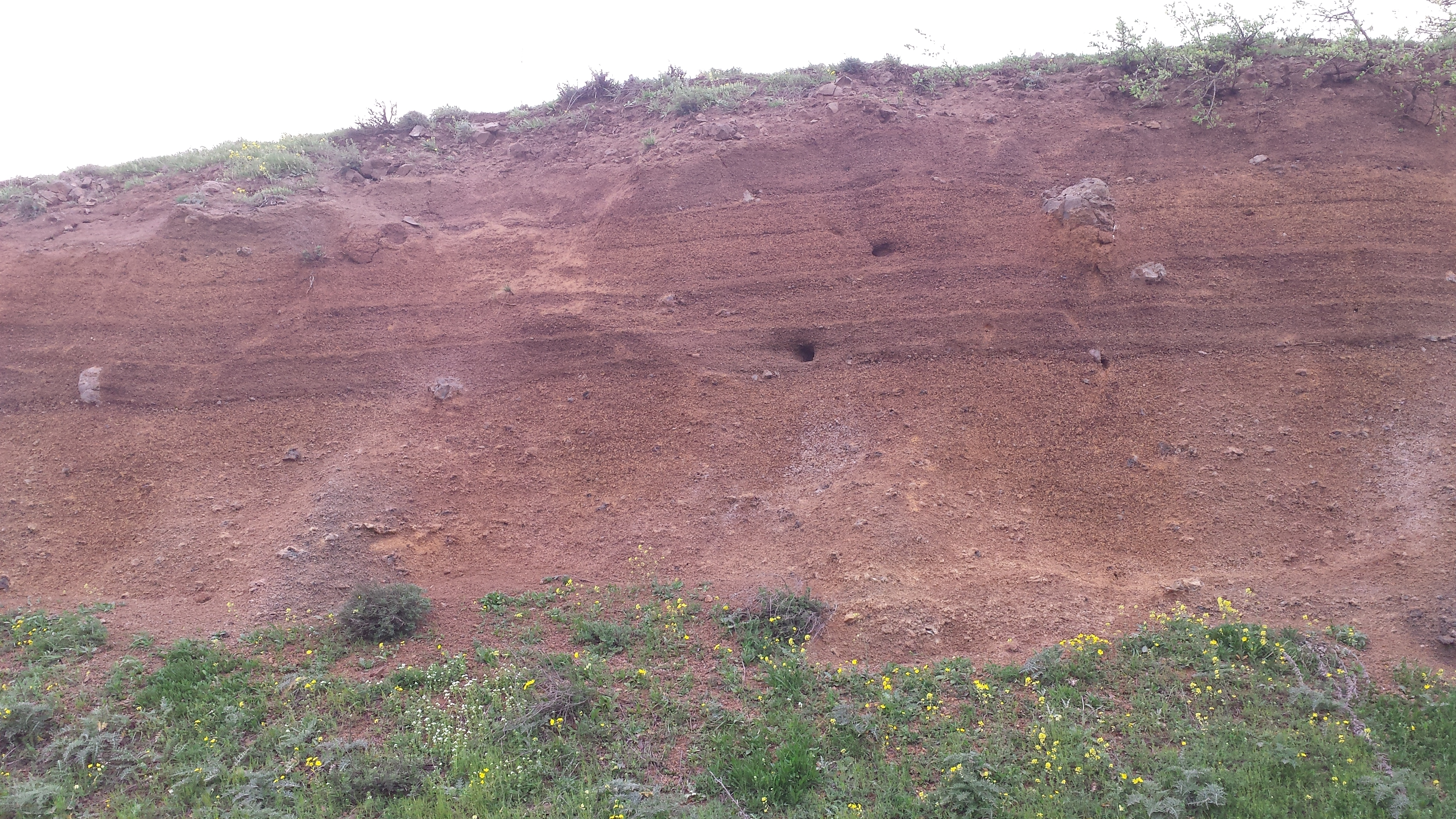 שכבת סקוריה אדומה דקת-גרגר שנחשפה בצד הדרומי של תל בנטל, רמת הגולן, ישראל